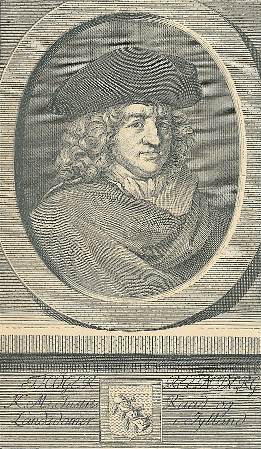 Thøger Reenberg. Stik fra titelbladet til "Poetiske Skrifter" fra 1769.